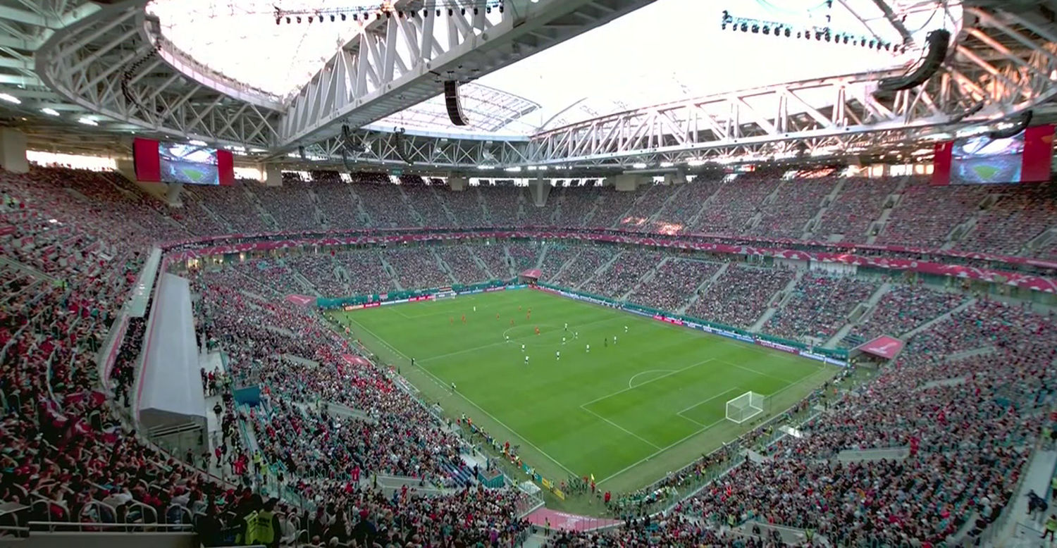 Финал Кубка конфедераций (57 268 зрителей).